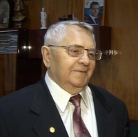 Василий Иванович в день 80-летия